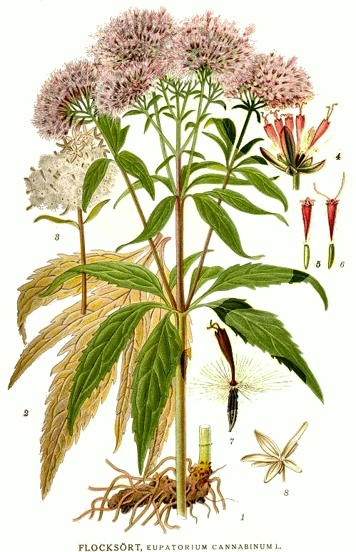 Original Description Floksört, Eupatorium cannabinum L.